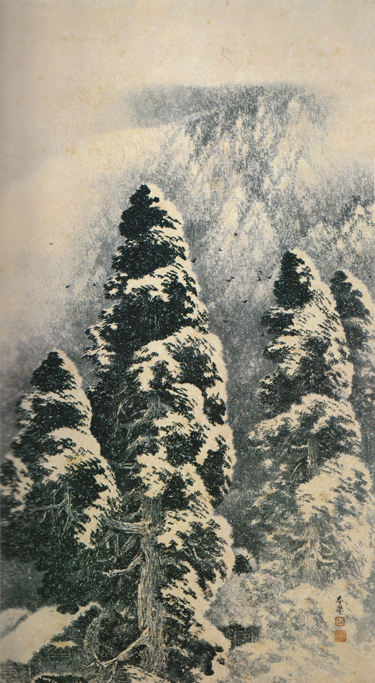 絵画 雪松景